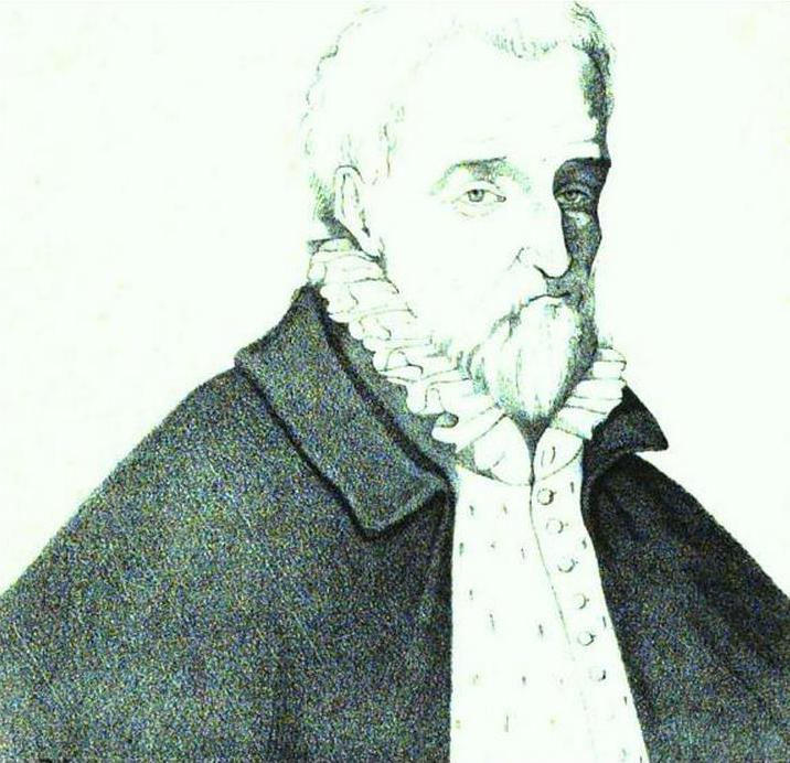 Antoine Richard (Anthoine Richart) (XVIe siècle), contrôleur à l'élection de Laon, auteur des Mémoires sur la Ligue dans le Laonnois , à lire en ligne